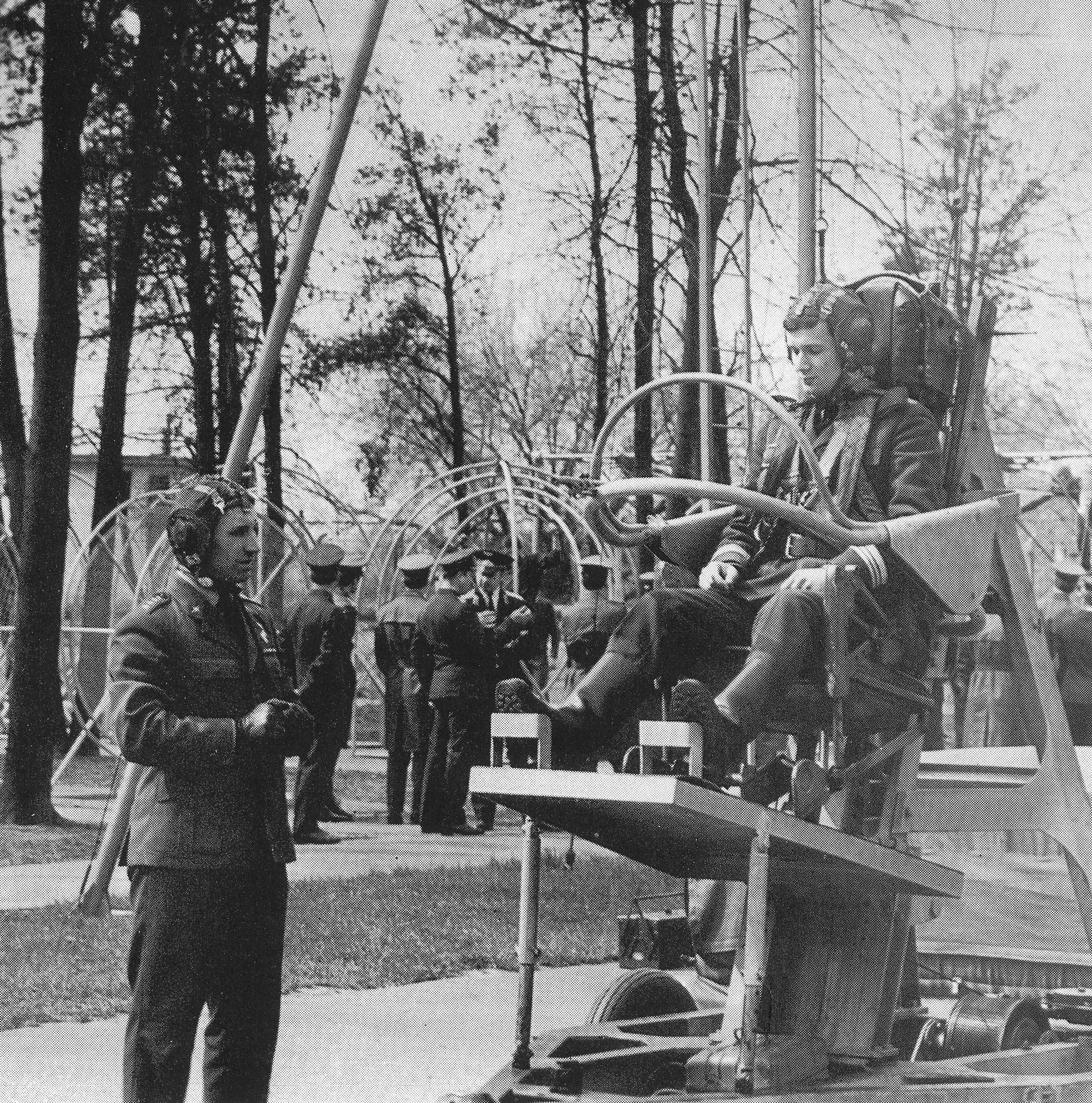 Trening pilotów w Wyższej Oficerskiej Szkole Lotniczej w Dęblinie